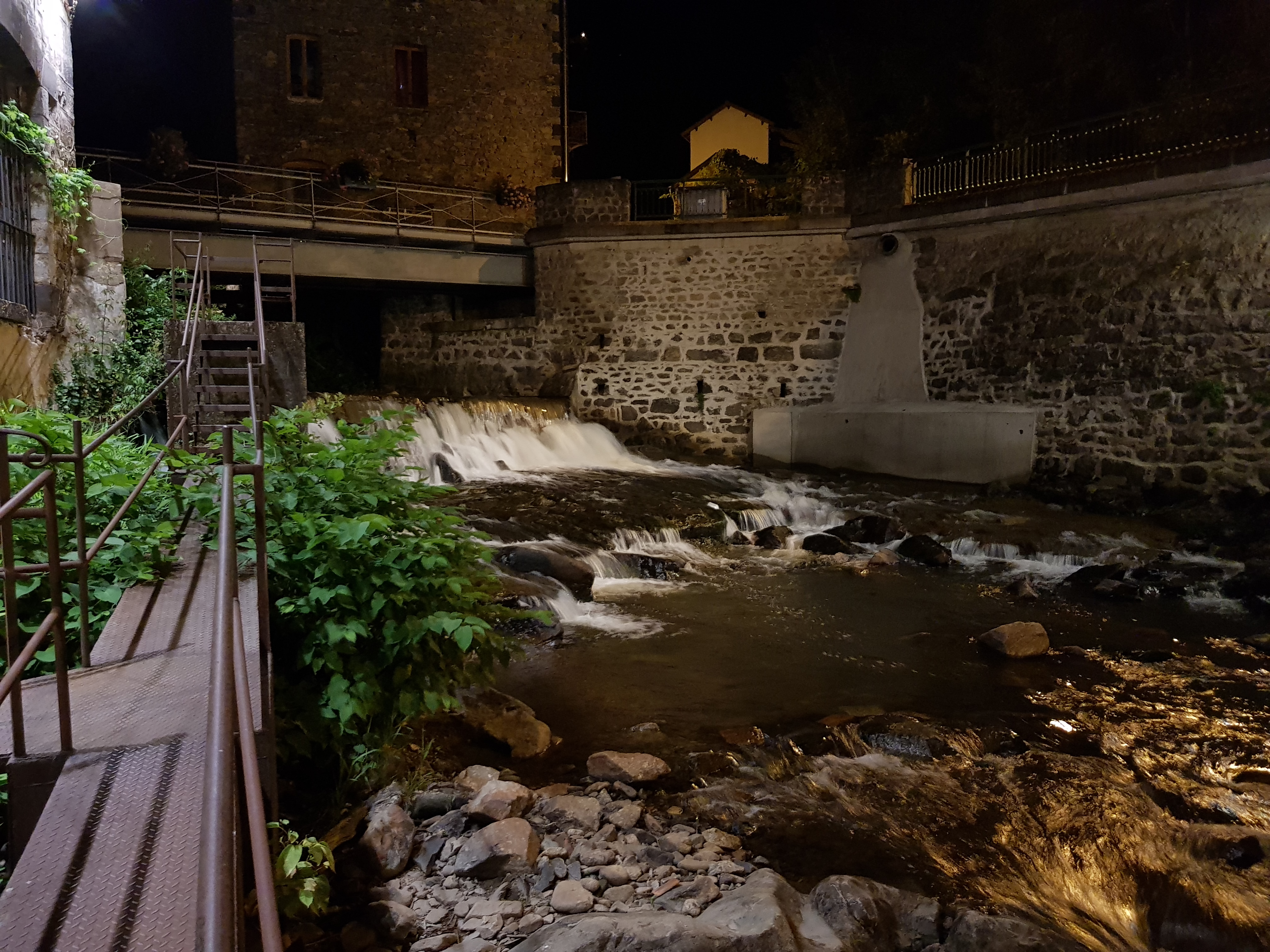 Usine du may